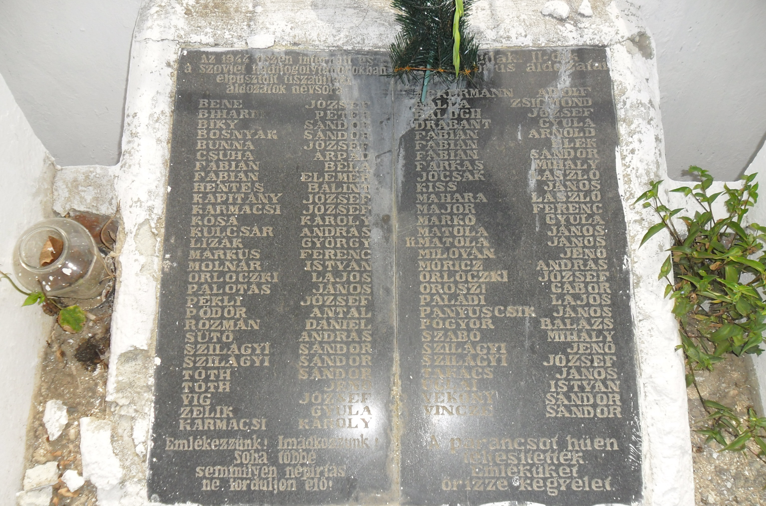 A sztálinizmus („málenykij robot”) áldozatainak névsora (Tiszaújlak, Kárpátalja, Ukrajna)